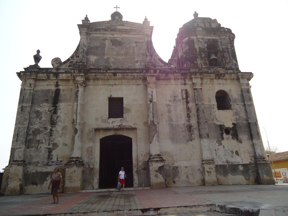 san Juan iglesia León, Nicaragua por Richard Weiss